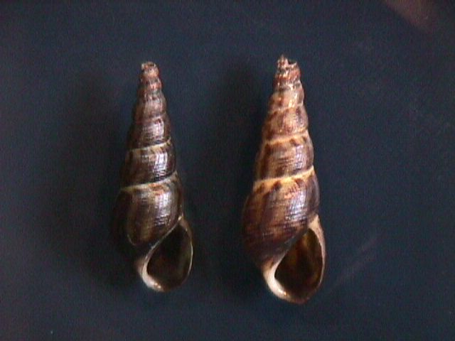 Melanoides tuberculata - IZT - UCV Caracas, Venezuela